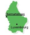 Lage Obermartelingens im Grossherzogtum Luxemburg